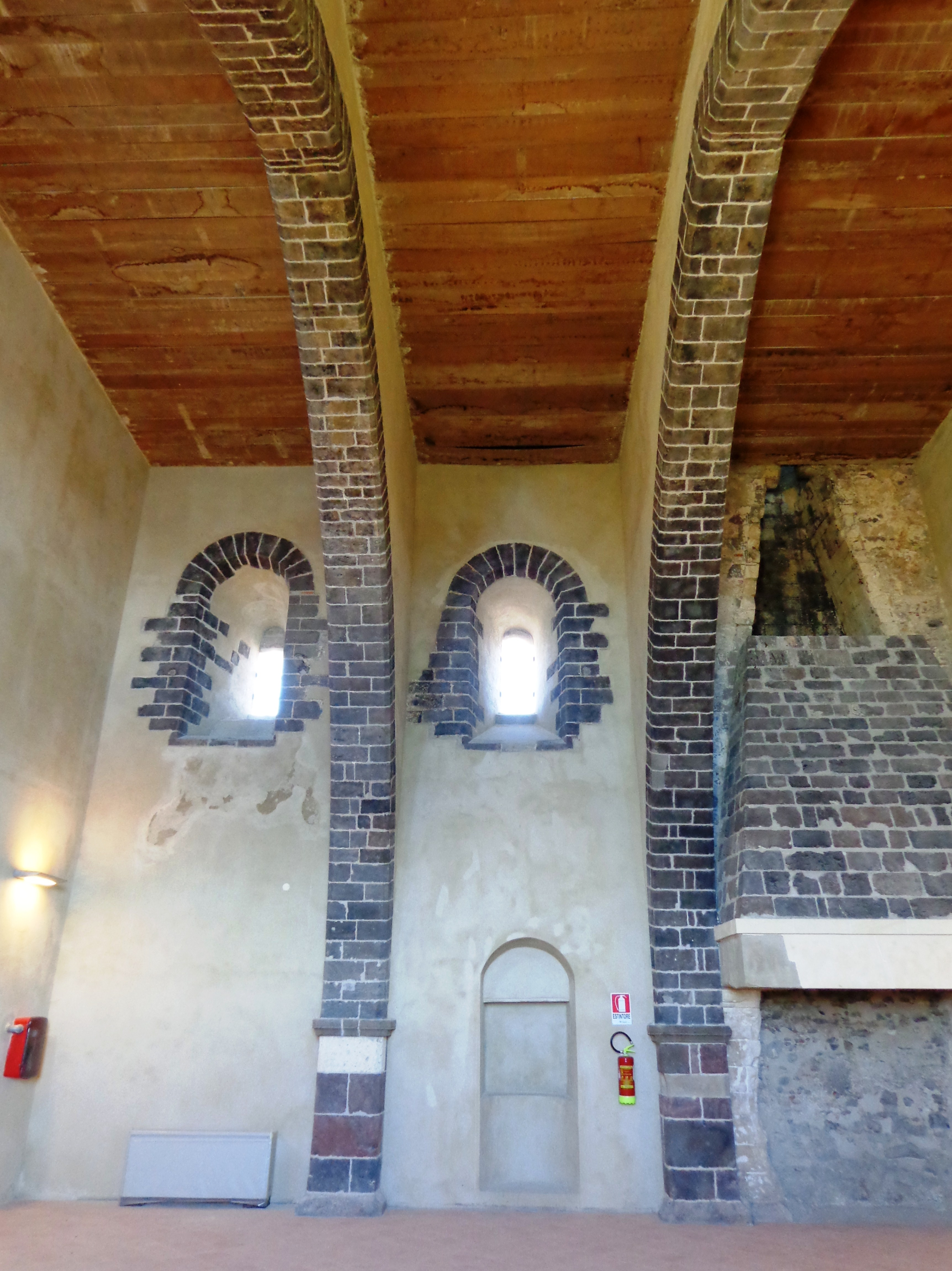 Nervature Sala del Parlamento